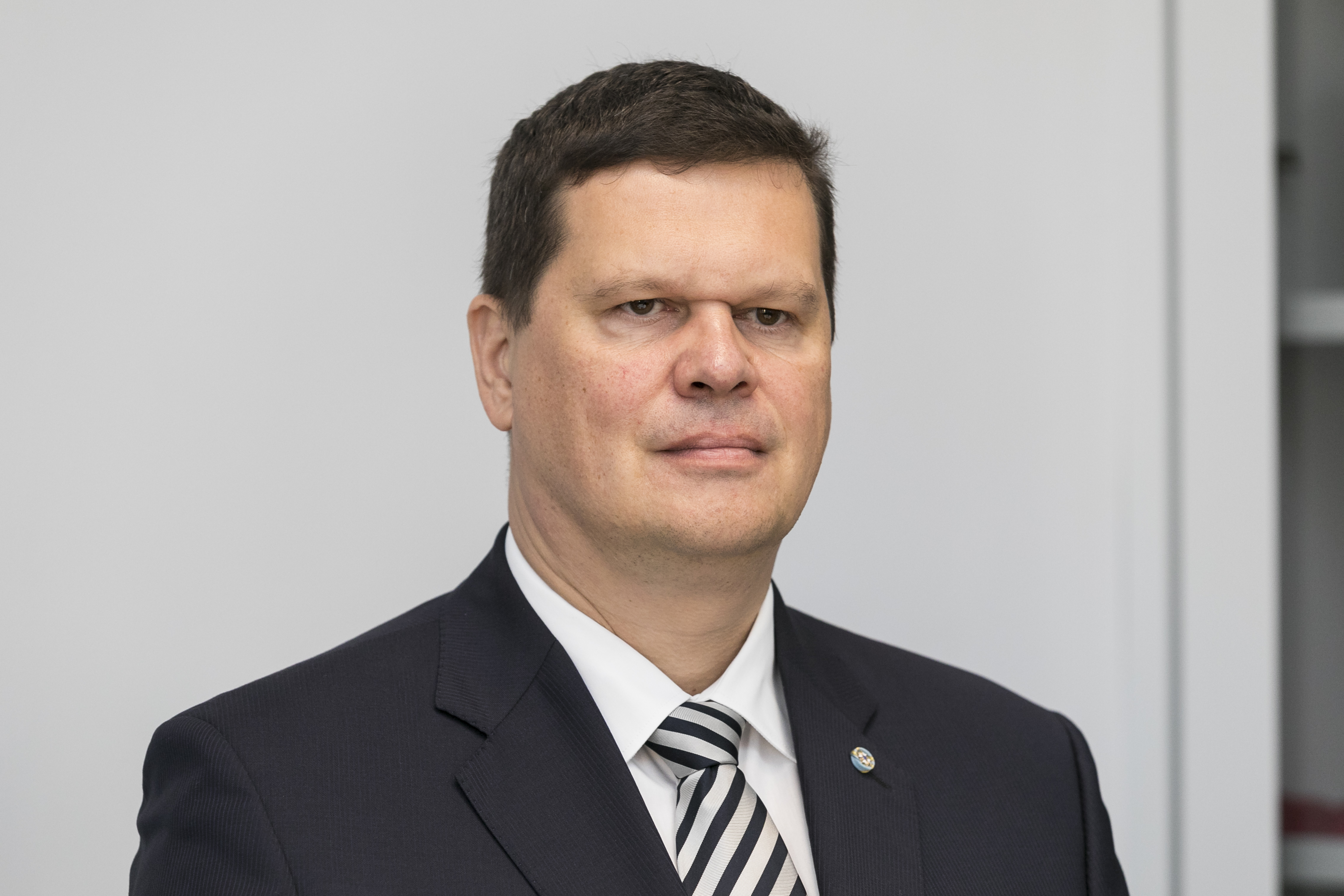 2017.gada 29.septembris. Saeimā paraksta Izglītības un zinātnes ministrijas, Vides aizsardzības un reģionālās attīstības ministrijas un UNESCO Latvijas Nacionālās komisijas sadarbības līgumu. Foto: Reinis Inkēns, Saeimas Administrācija Izmantošanas noteikumi: saeima.lv/lv/autortiesibas